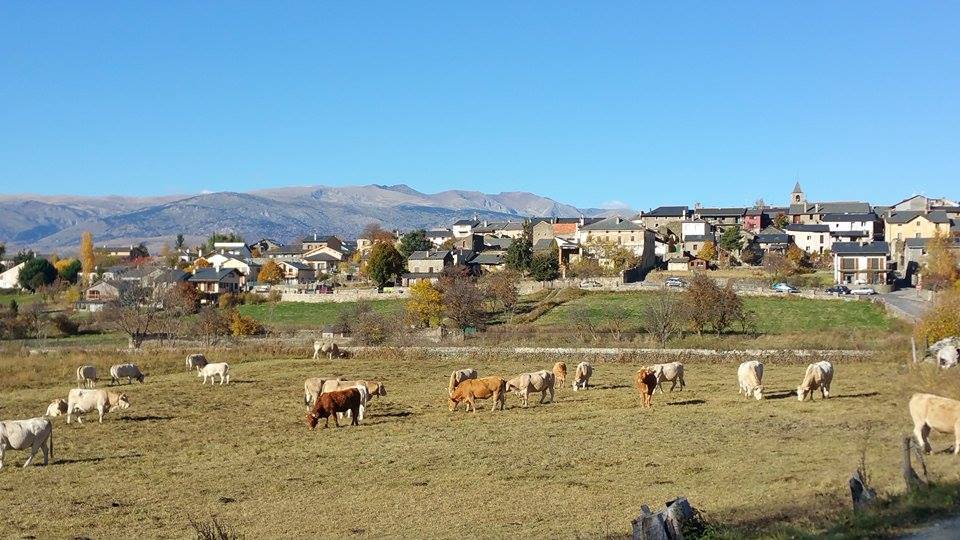 Vue générale de Palau-de-Cerdagne